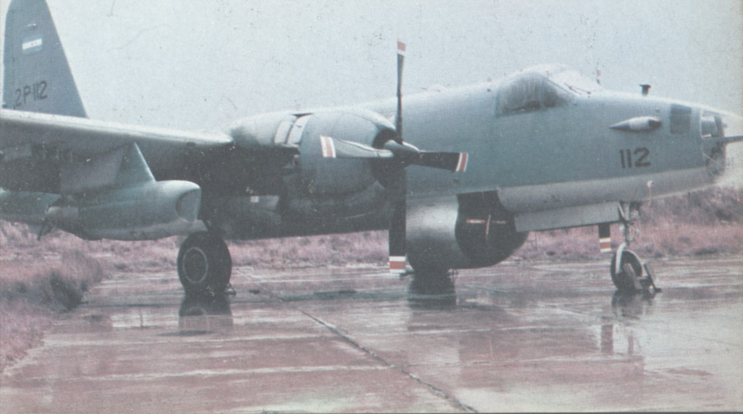 Avión de reconocimiento Neptune SP-2H, que cumplió un papel decisivo en la localización y hundimiento del HMS Sheffield.